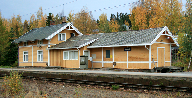 Nygard stasjon, Gjøvikbanen